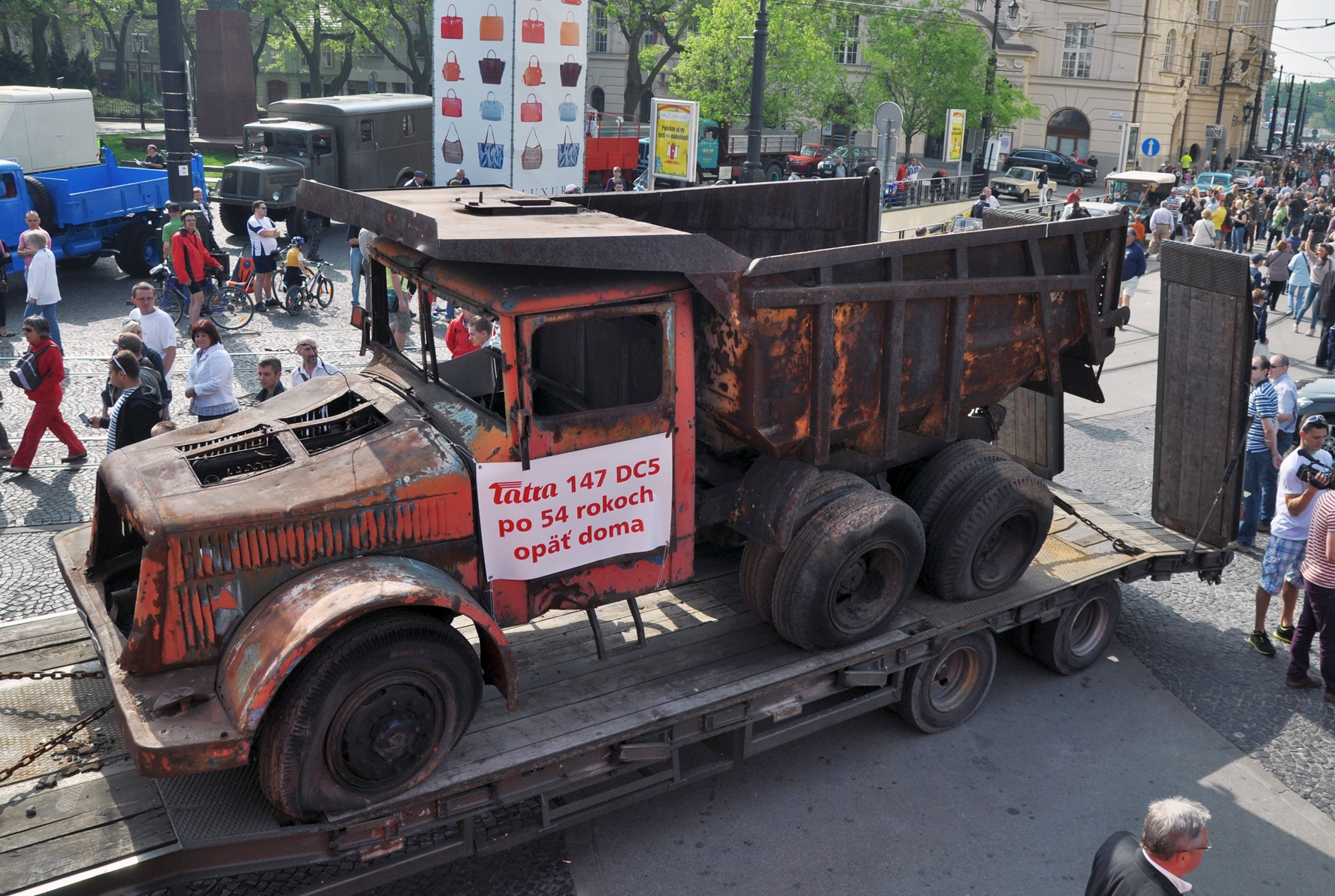 Veterány jazdia po kraji rely